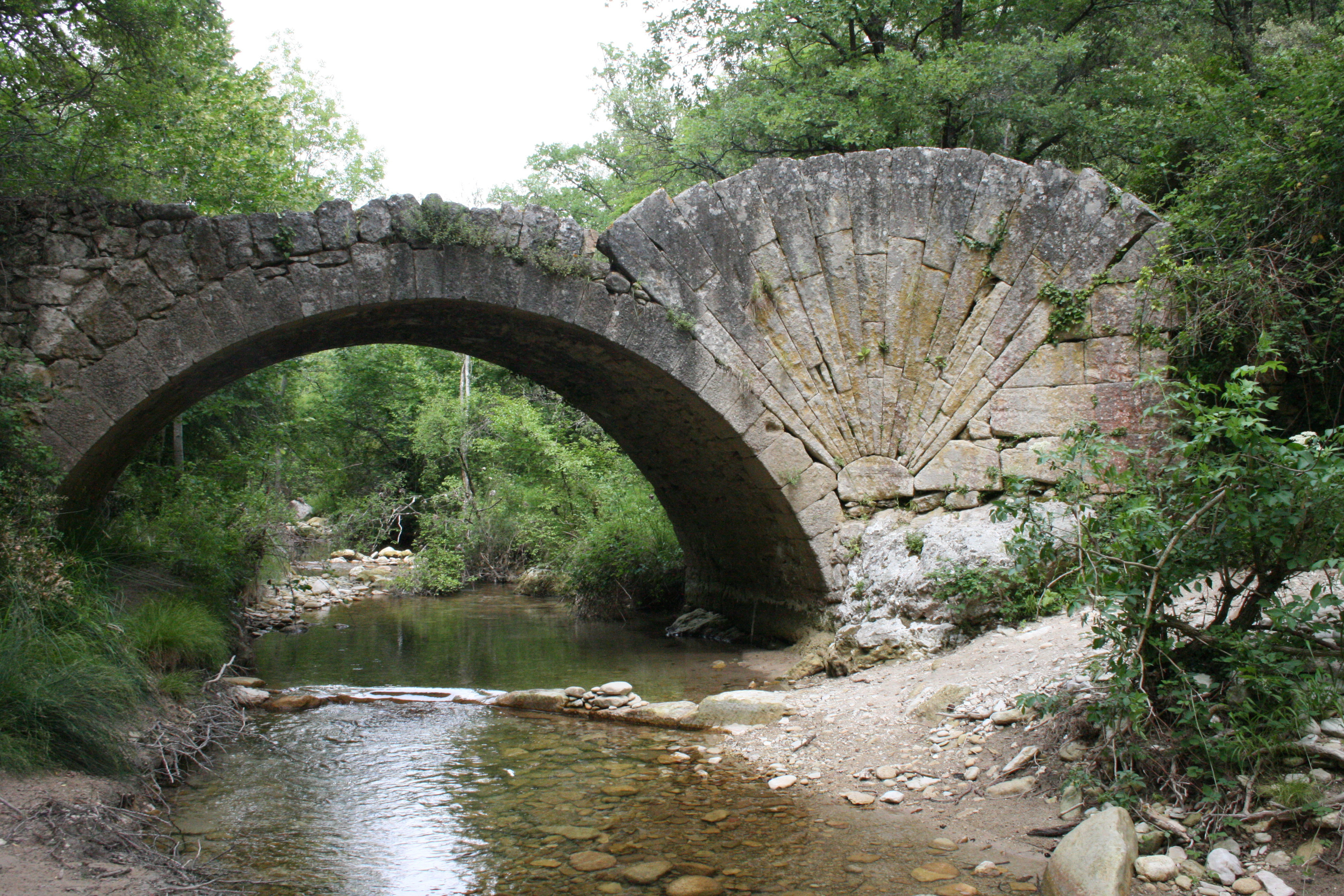 Bonnieux, département du Vaucluse (France). Pont à coquille. Vallon de l'Aiguebrun